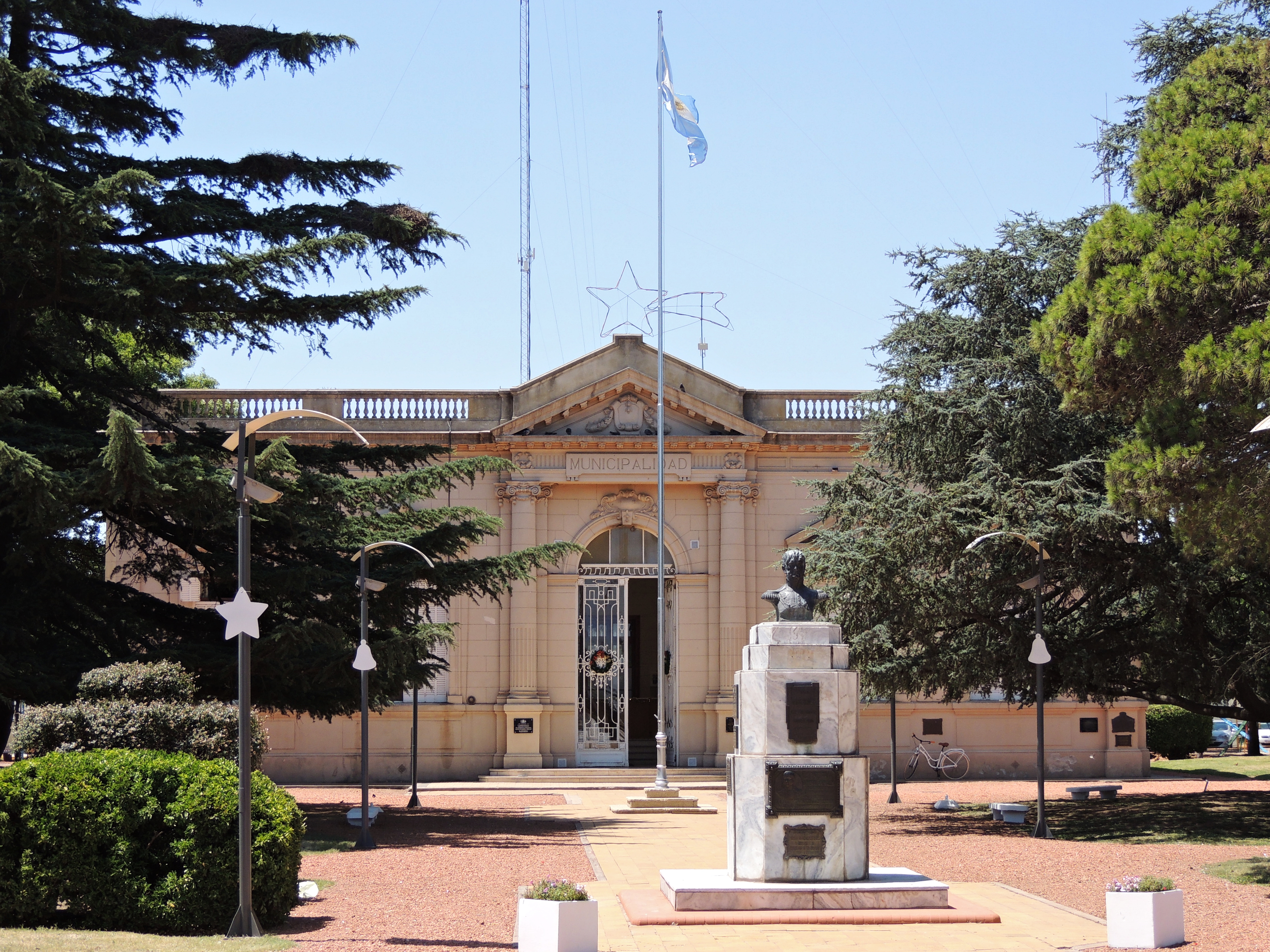 General Arenales, Buenos Aires, Argentina